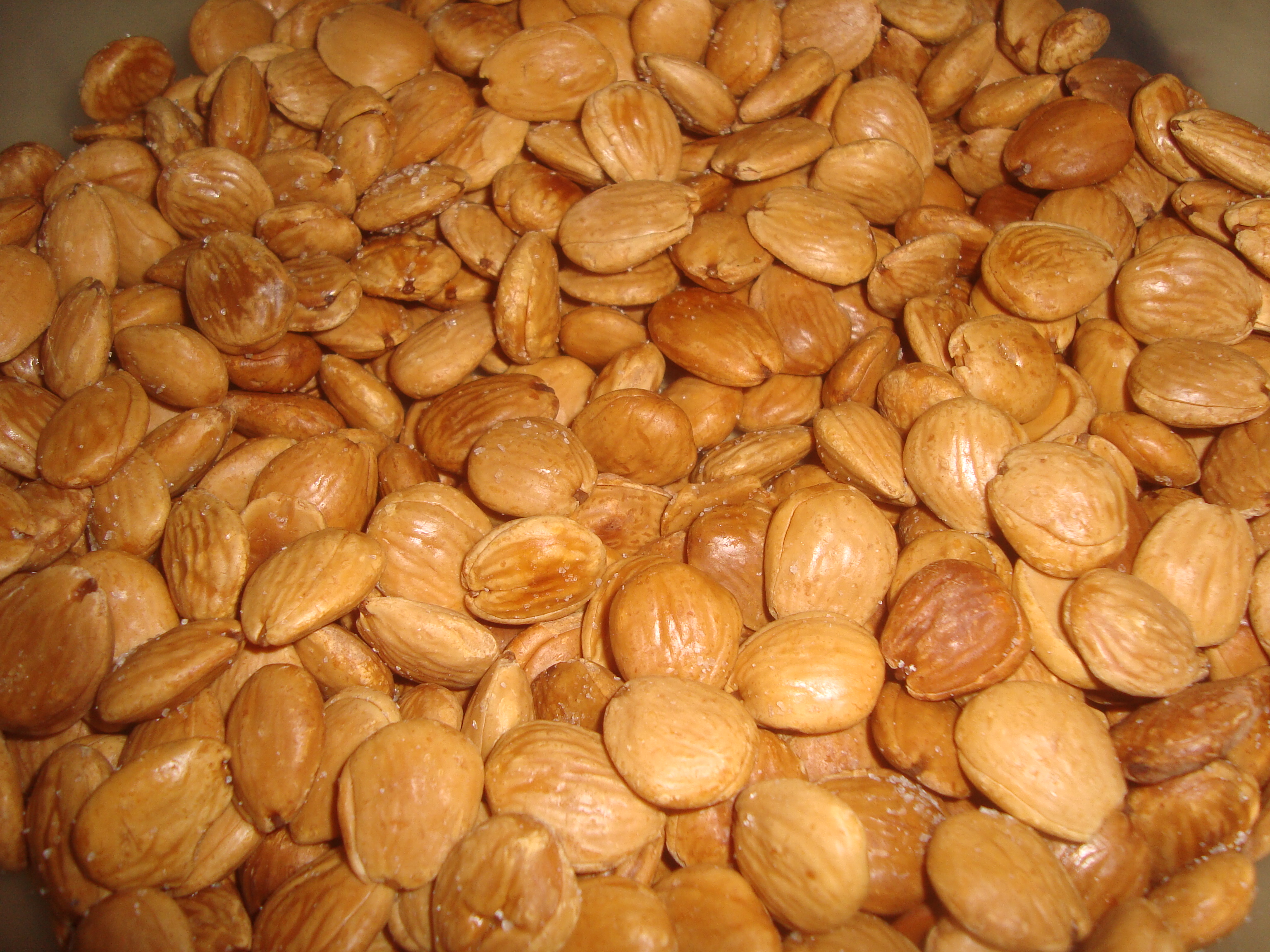 Almendras fritas, aperitivos (España). This photo has been taken in the country: Spain